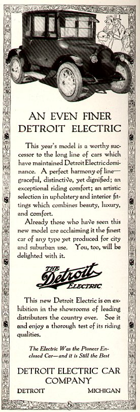 Detroit Electric automobile advertisement